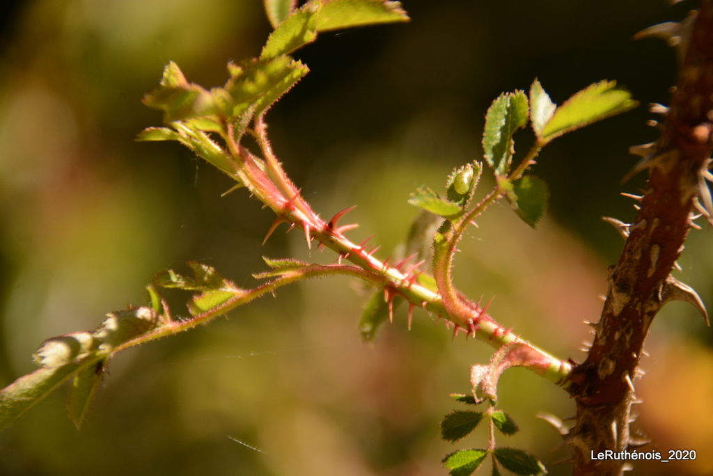 Rosa x aveyronensys, nouvelle tige avec des aiguillons peu courbés